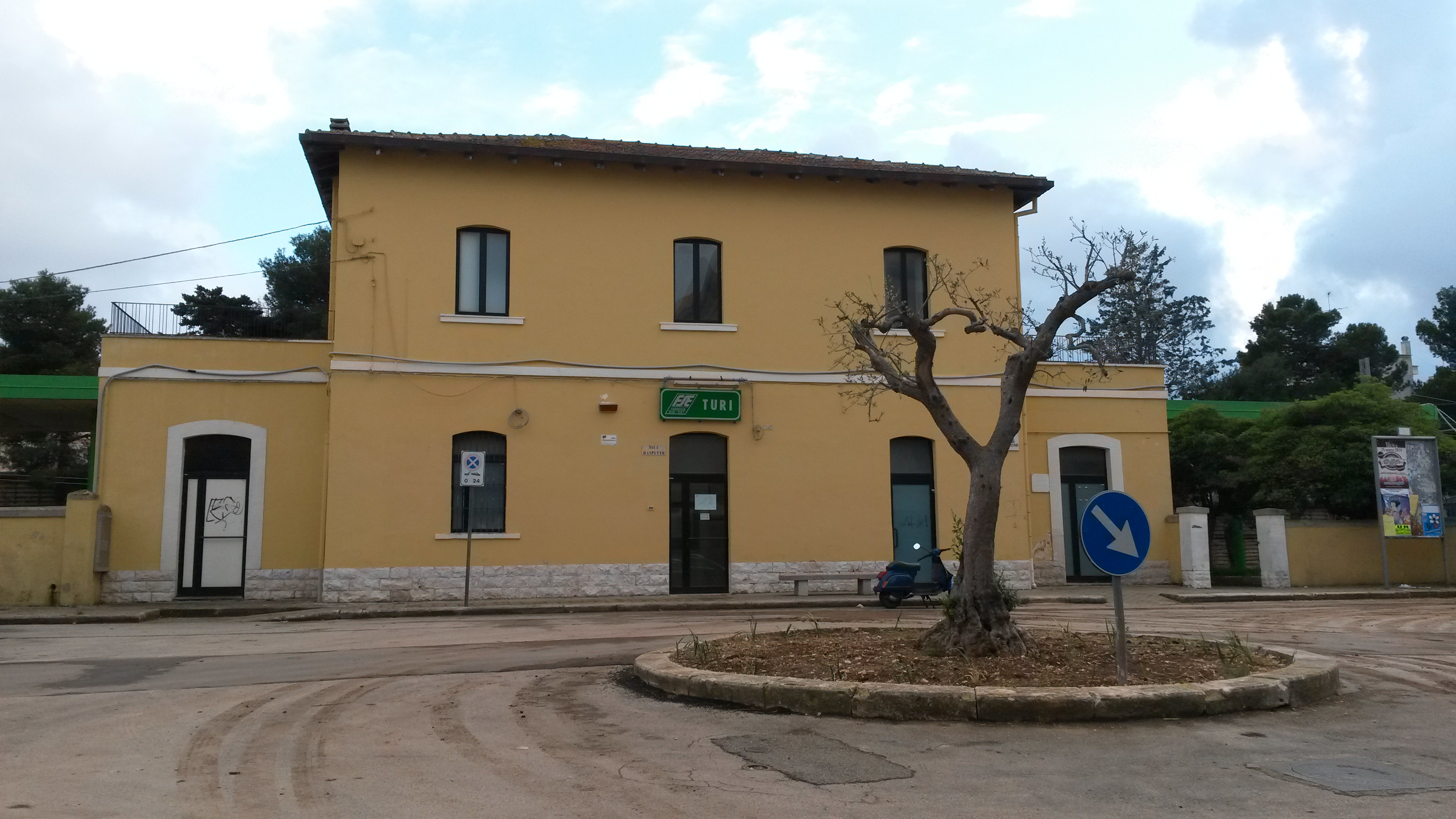 Stazione FSE di Turi